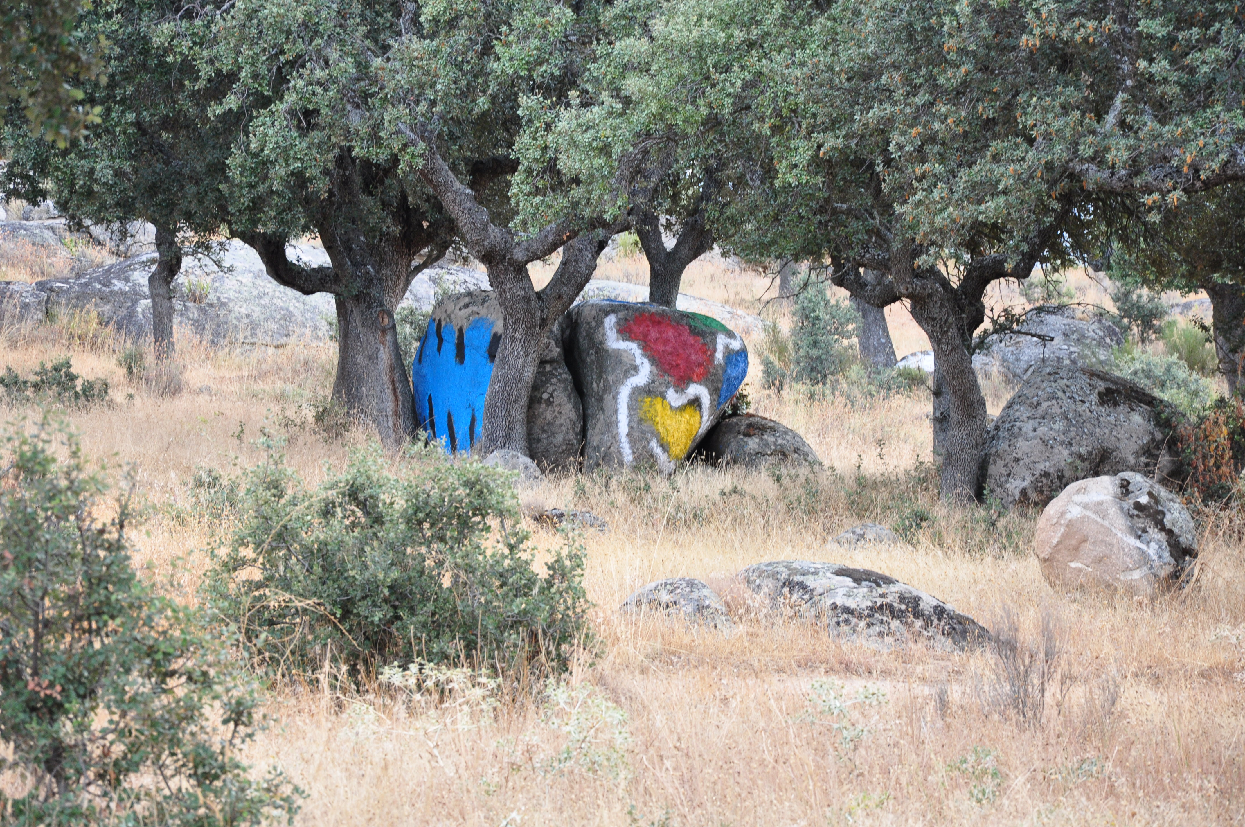 Piedras pintadas por Ibarrola en Garoza, Muñogalindo (Ávila), España. This is a photography of a Site of Community Importance in Spain with the ID: ES4110112. Natura2000 entry, EEA entry